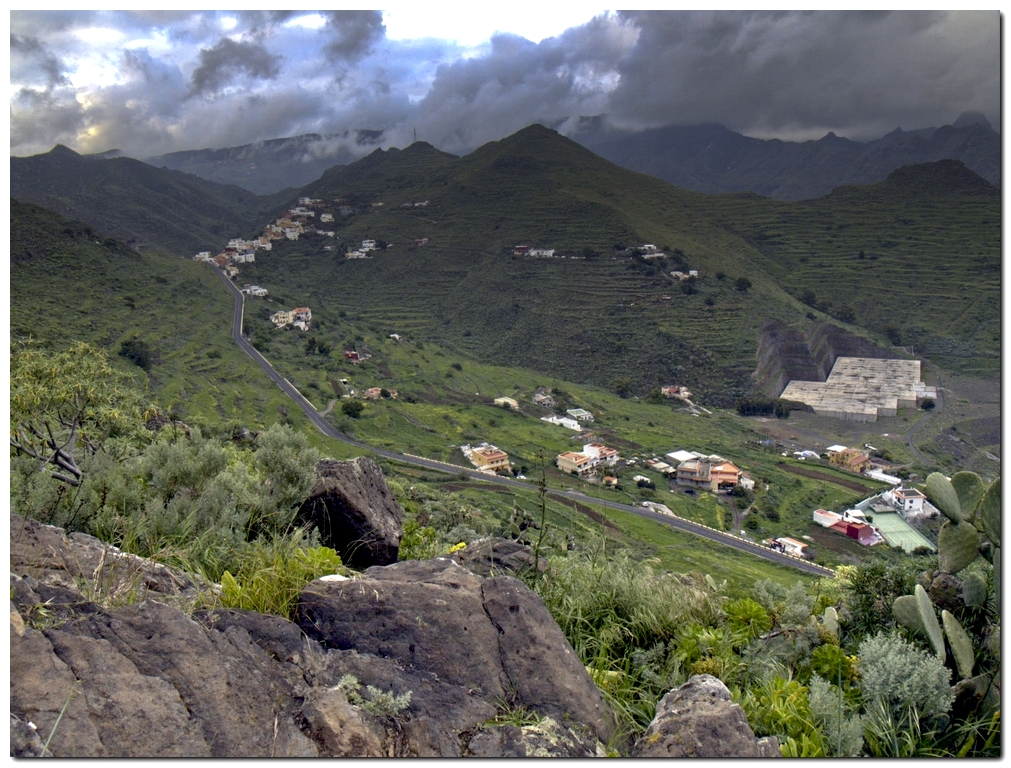 Vista de Los Campitos desde el parque de Las Mesas